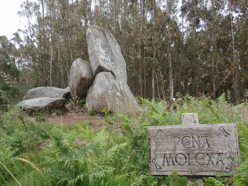 Imagem da Pena Molexa (Narom, Galiza)